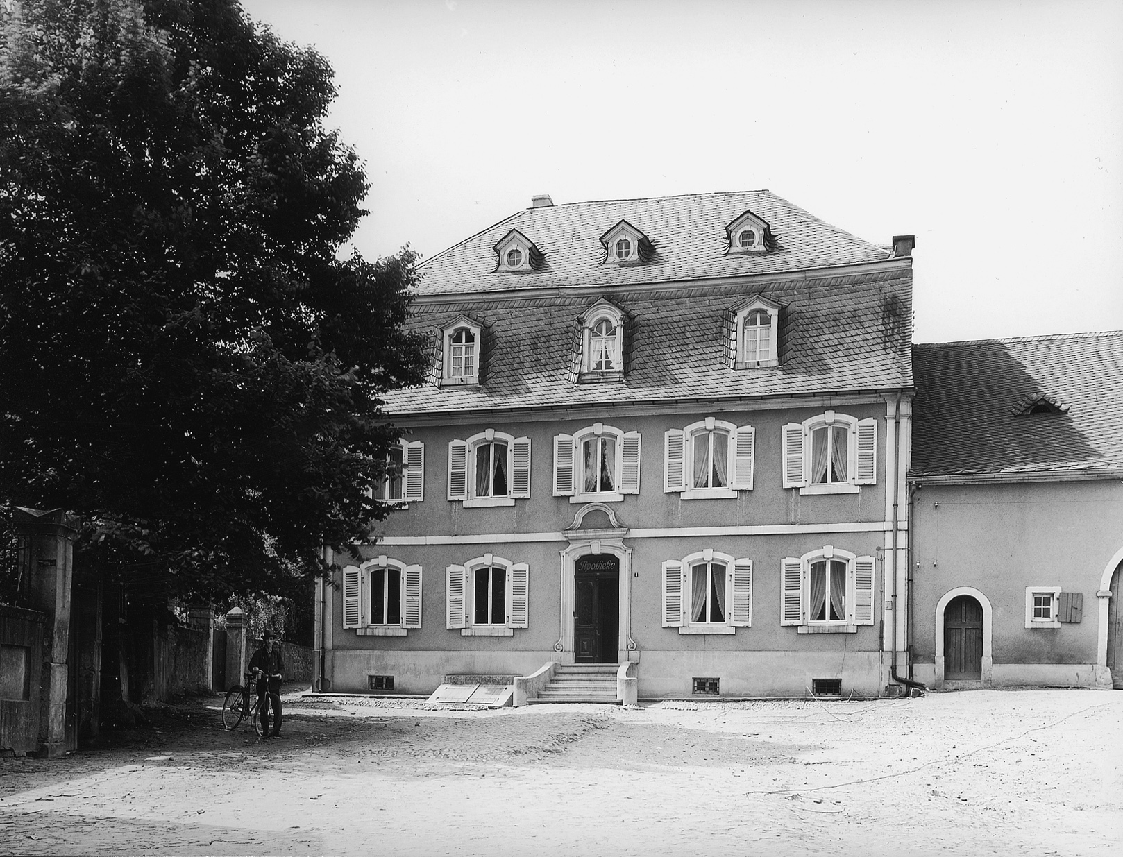 In den 30er Jahren befand sich im "Öttinger Schlösschen" noch eine Apotheke